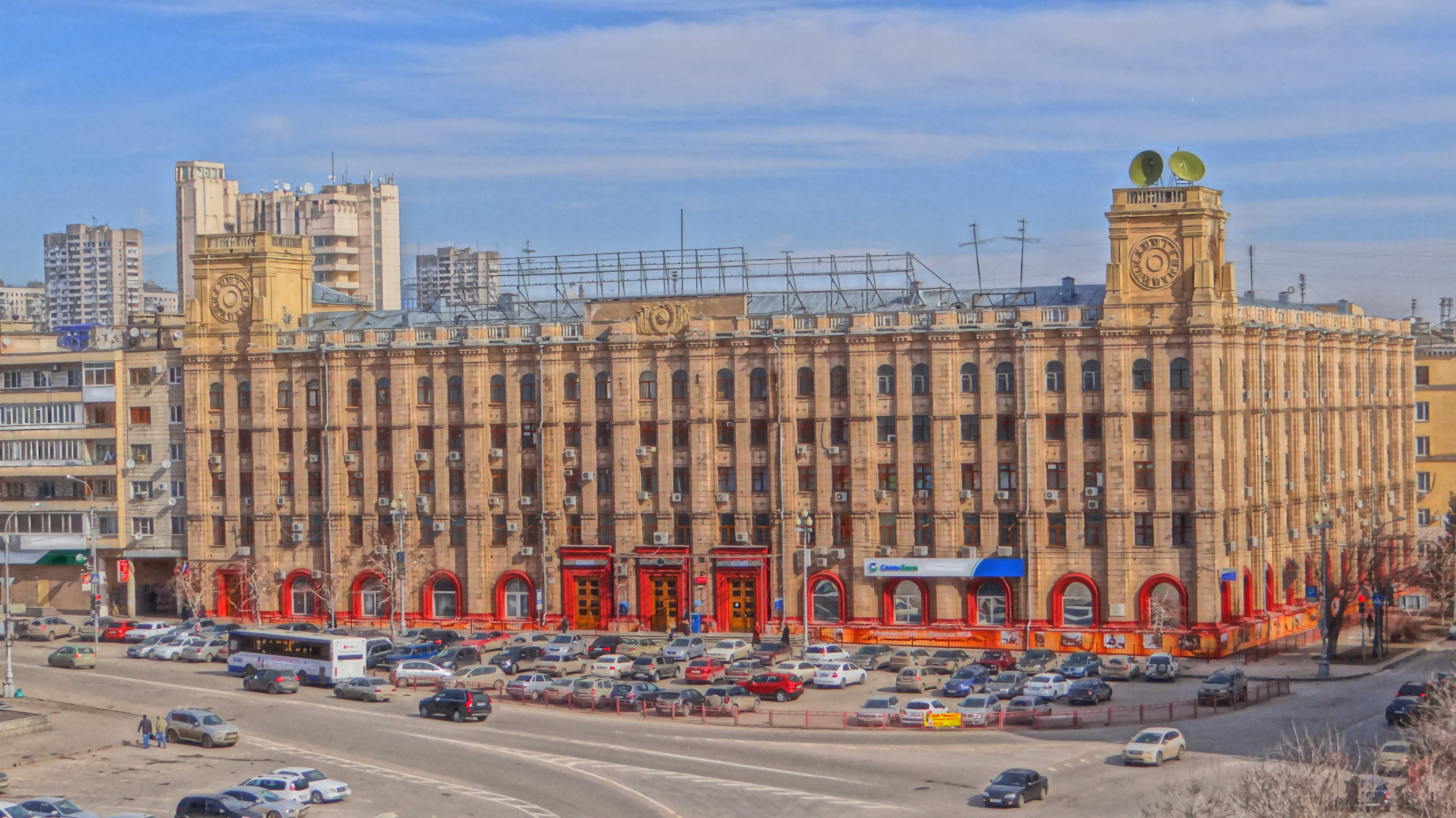 Tsentralnyy rayon, Volgograd, Volgogradskaya oblast', Russia